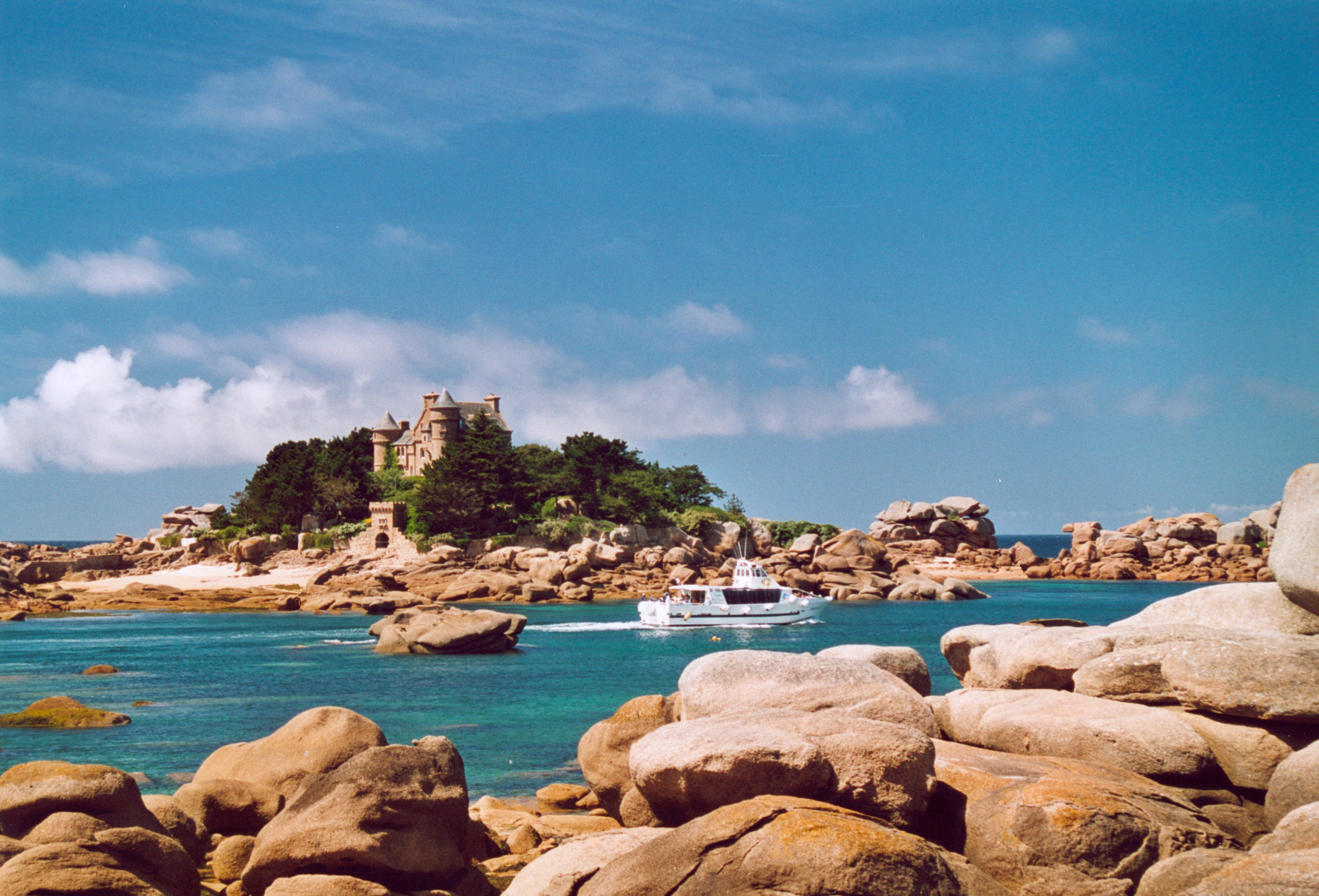 France Bretagne Côtes d'Armor Côte de granit rose